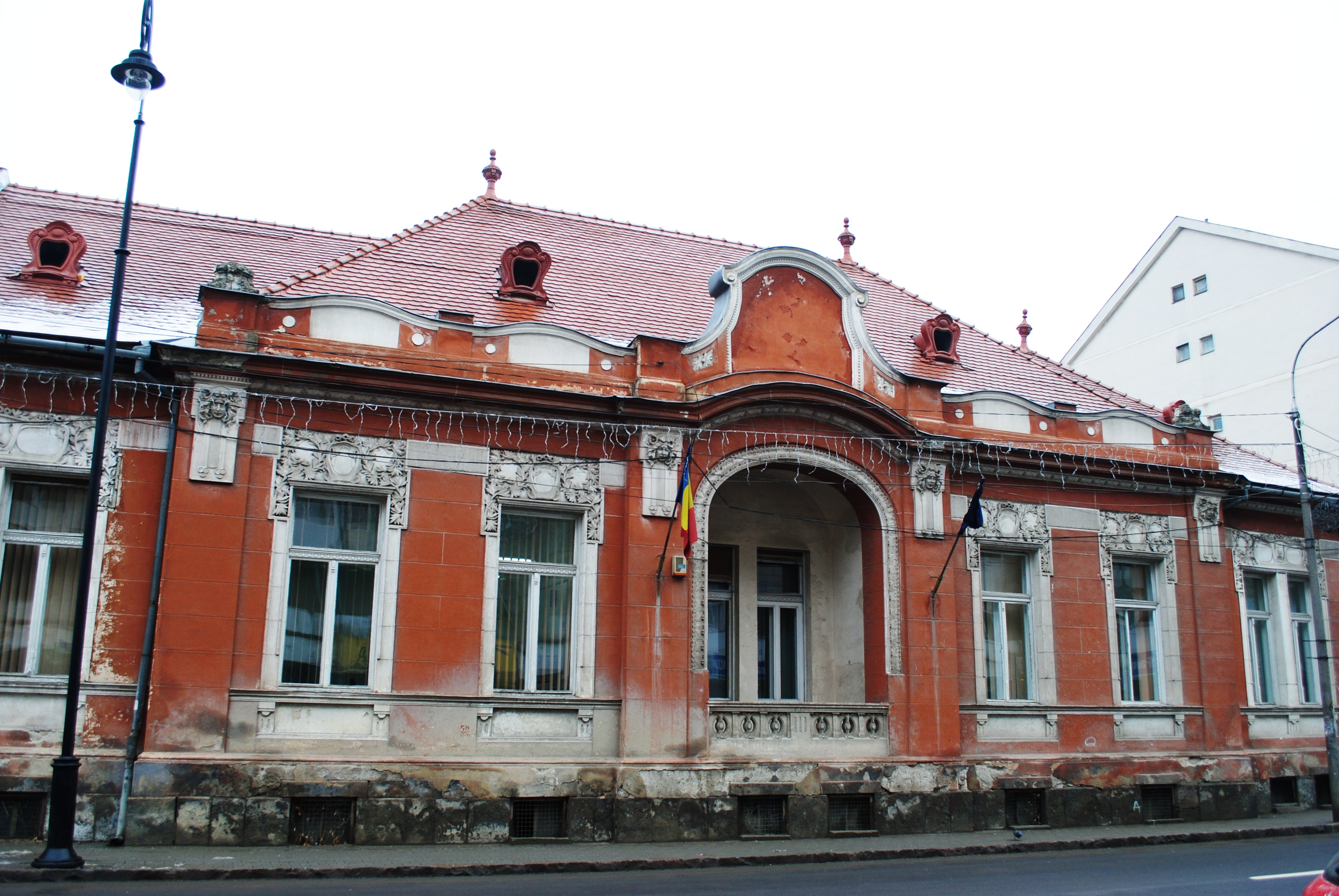 Casa Bene, înc. sec. XX